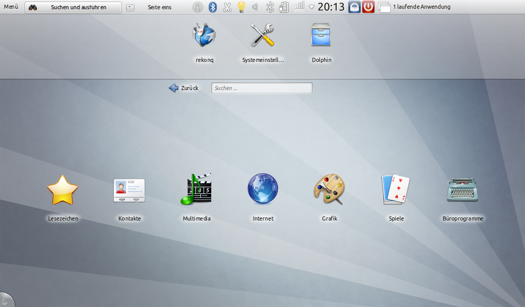 Desktop Theme Kubuntu 12.04 / Bildschirm von Kubuntu 12.04